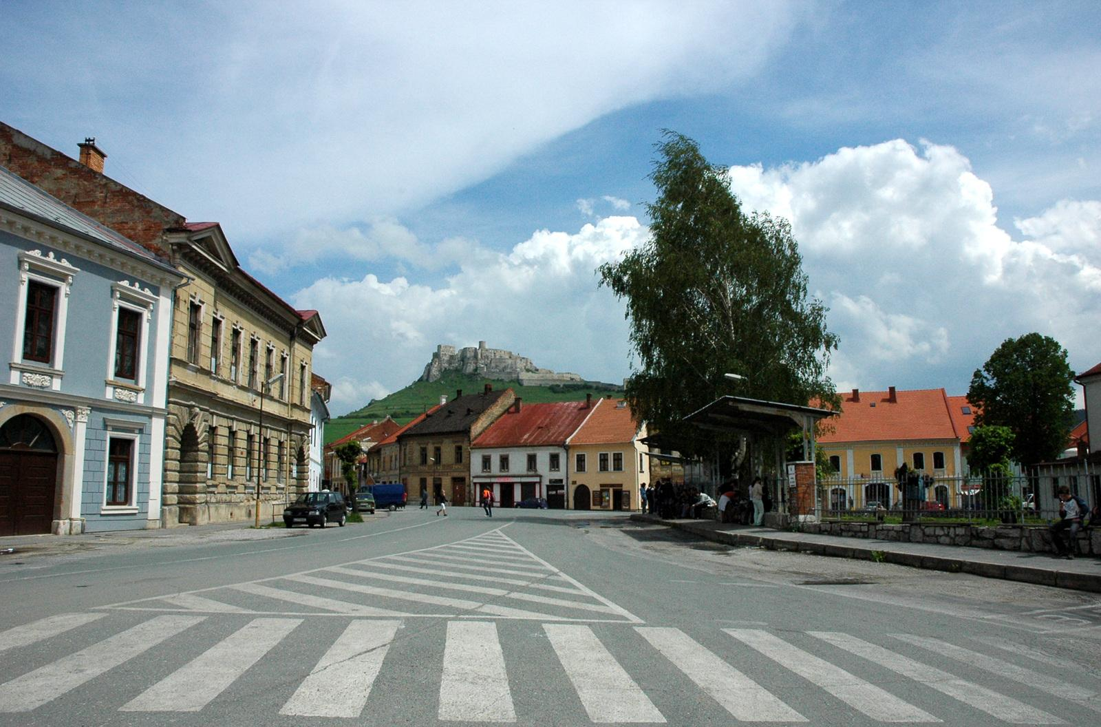 Spišské Podhradie, v pozadí Spišský hrad